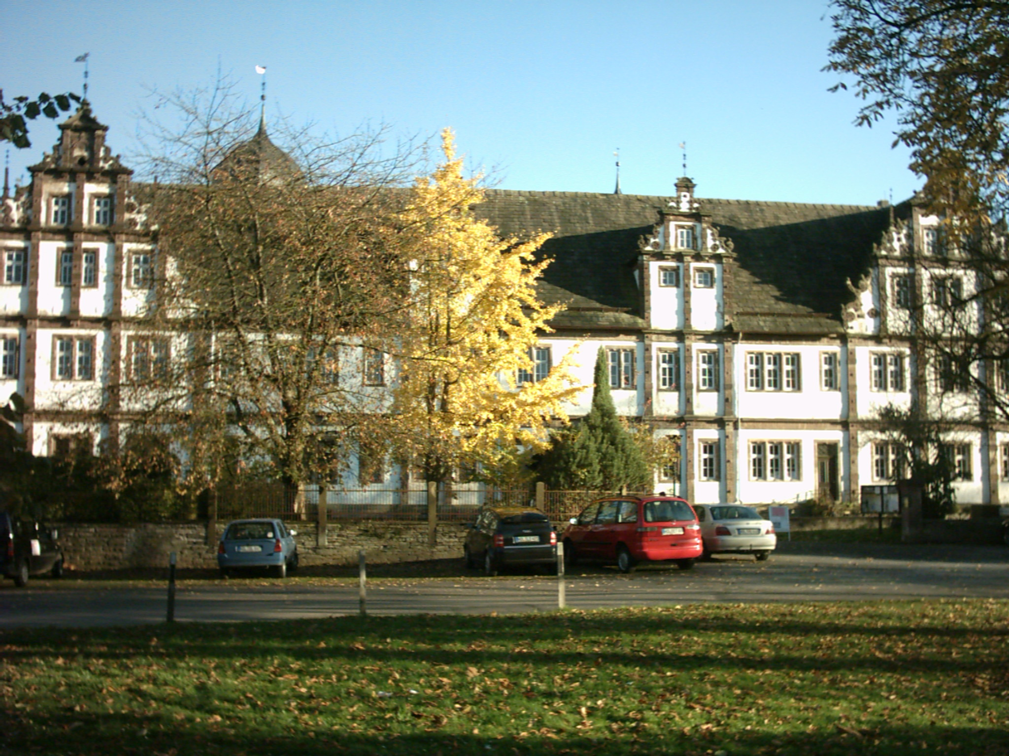 Schloss Bevern - selbst fotografiert 10/2005 - GNU-FDL